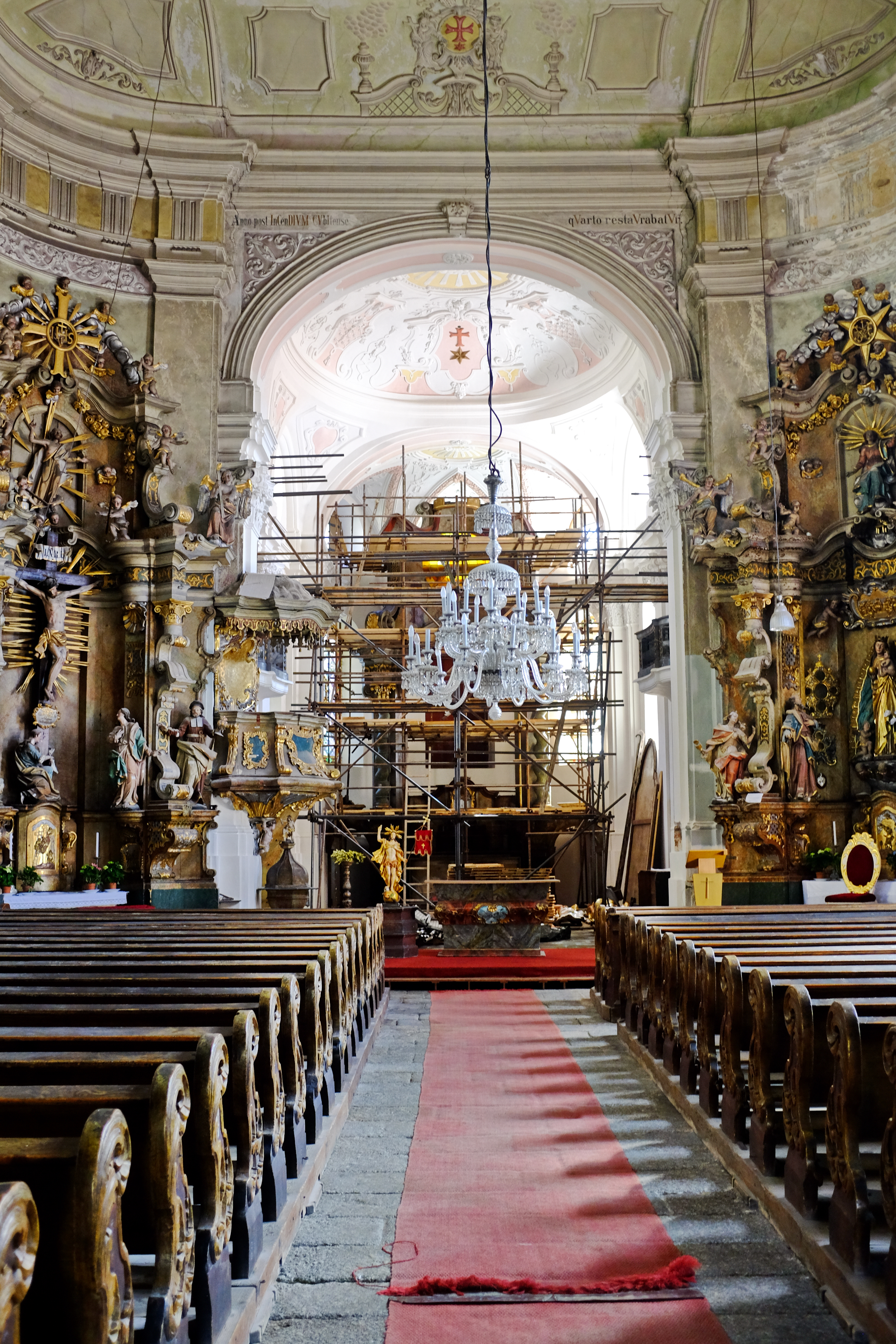 Kostel svatého Václava, Kostelní 14/3, Loket (okres Sokolov).